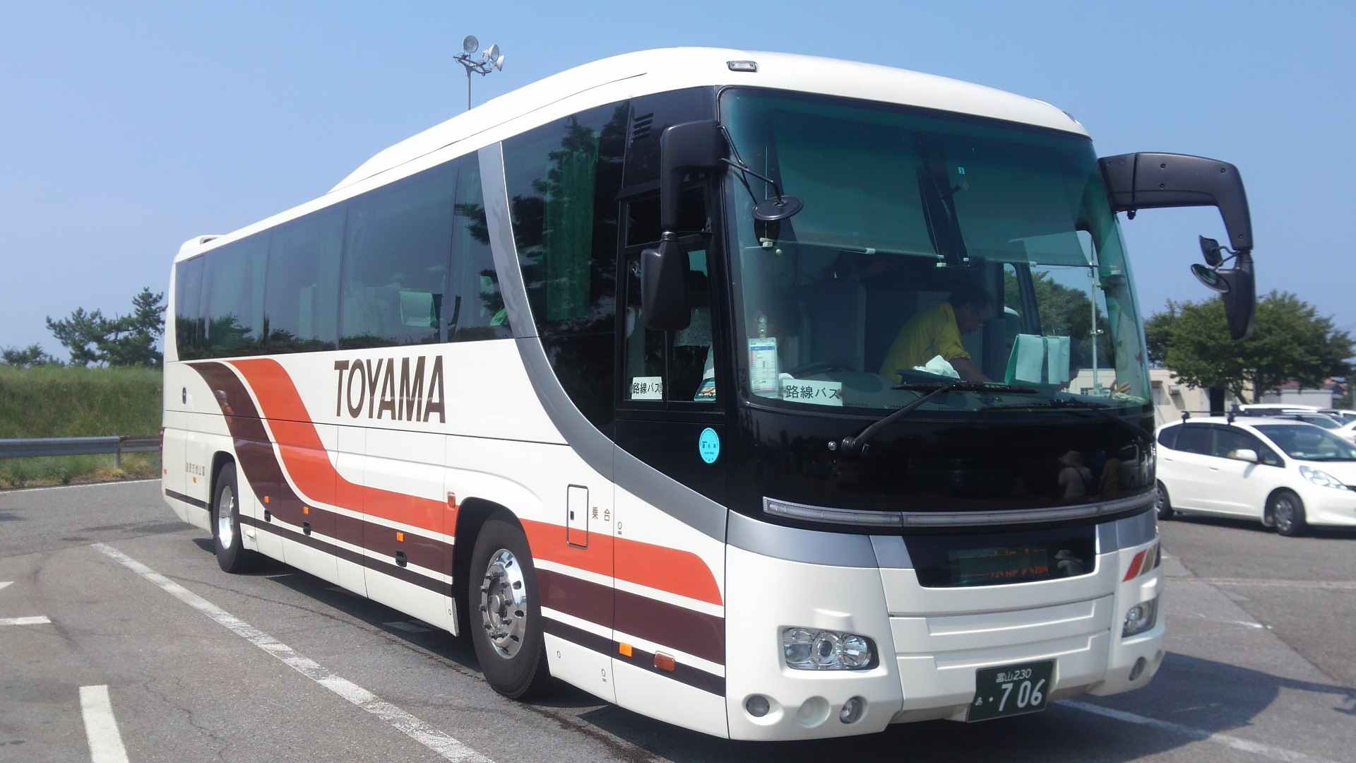 これまで主流だった日産ディーゼル車に代わって富山地鉄高速バスの主流になっている日野セレガ。尼御前サービスエリアで。